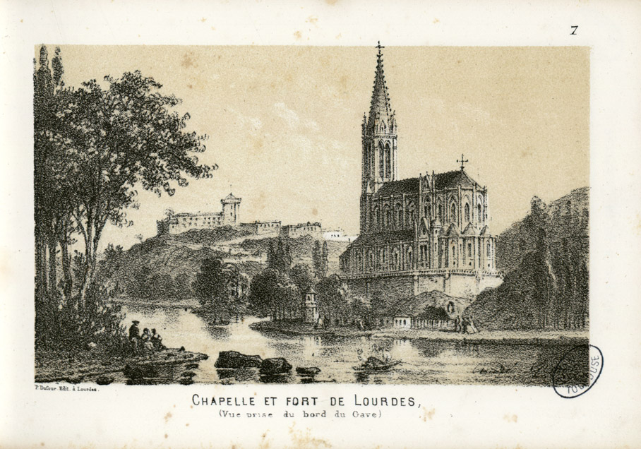 Fait partie d'un album de 18 planches lithographiées dont certaines sont signées. Pl. imprimées chez Monrocq à Paris. Titre en lettres d'or sur le plat supérieur. Les dessins des lithographies n° 5, 6, 7, 13 paraissent signés André Gorse. L'identification est certaine car le dessin original de la lithographie n°4 est signé A. Gorse. Ancely, René (1876 - 1966). Possesseur